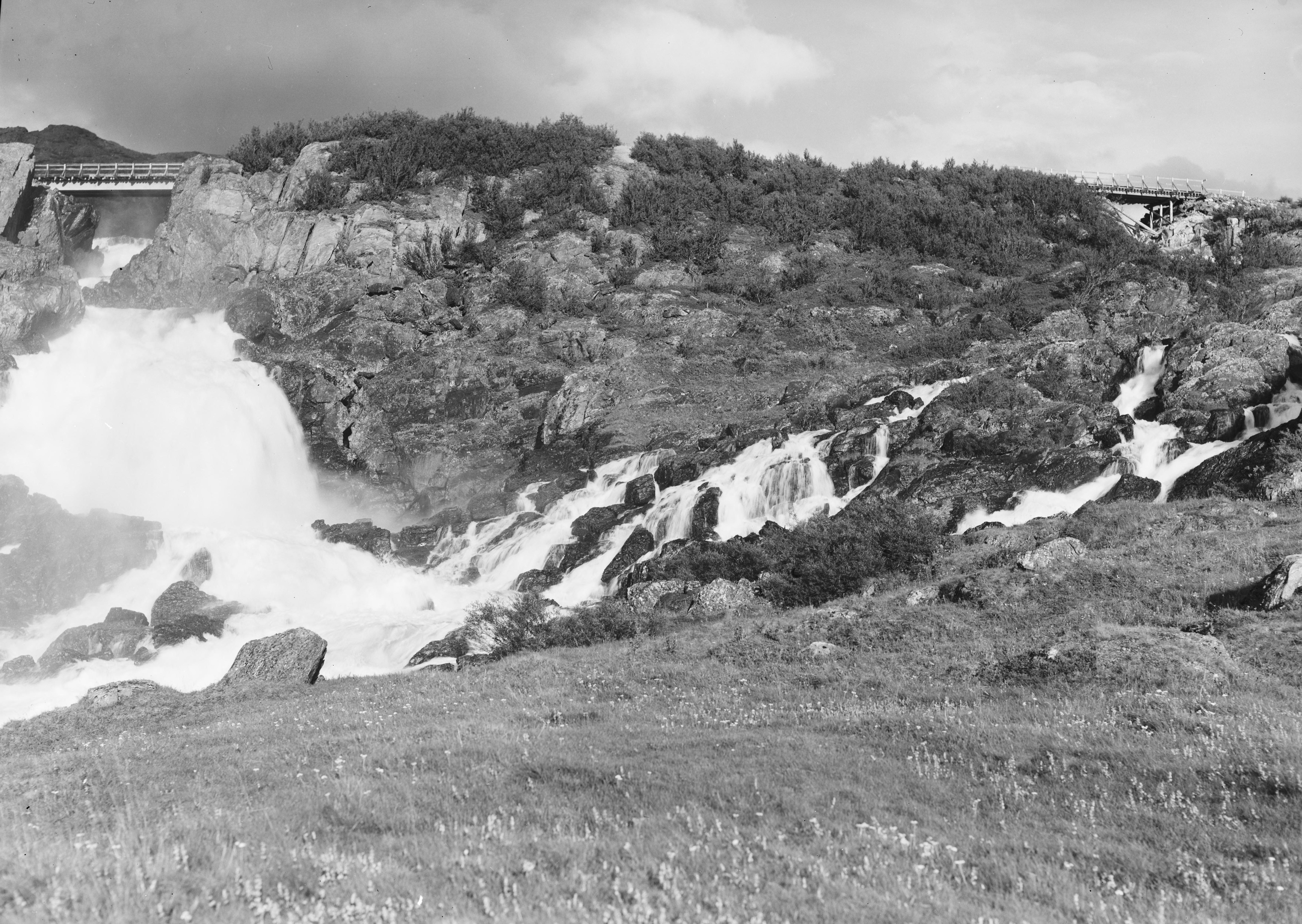 Bildet er hentet fra Nasjonalbibliotekets bildesamling. Anmerkninger til bildet var: fotograf ukjent. Adamsfjordfossen, Lebesby, Finnmark